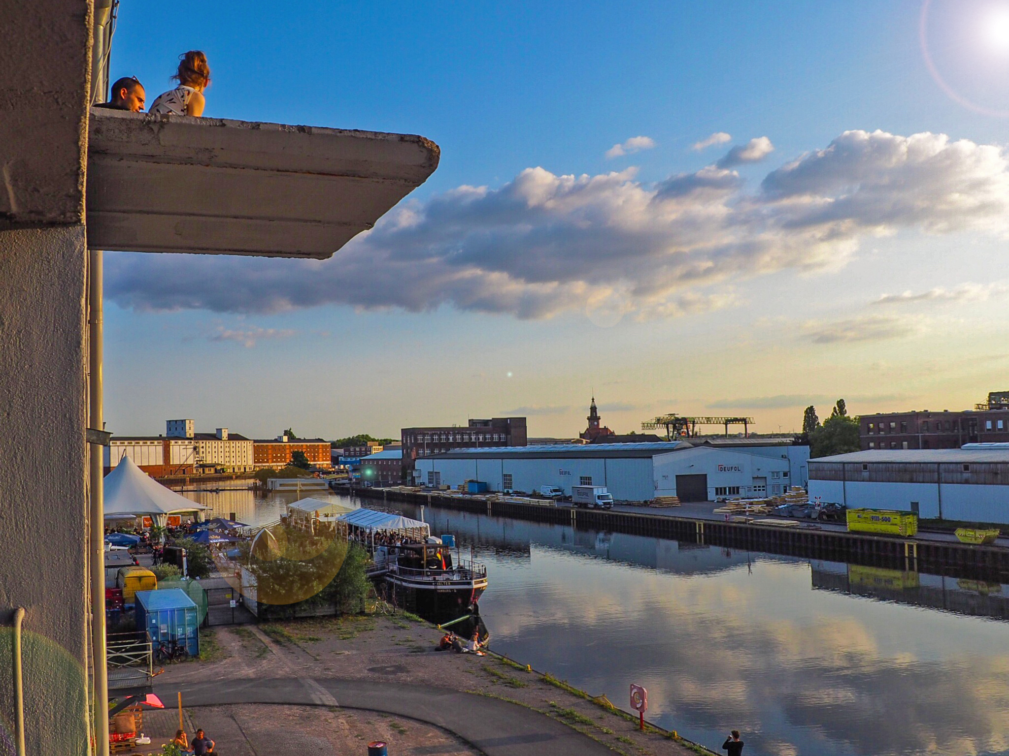 Hafenfest Dortmund